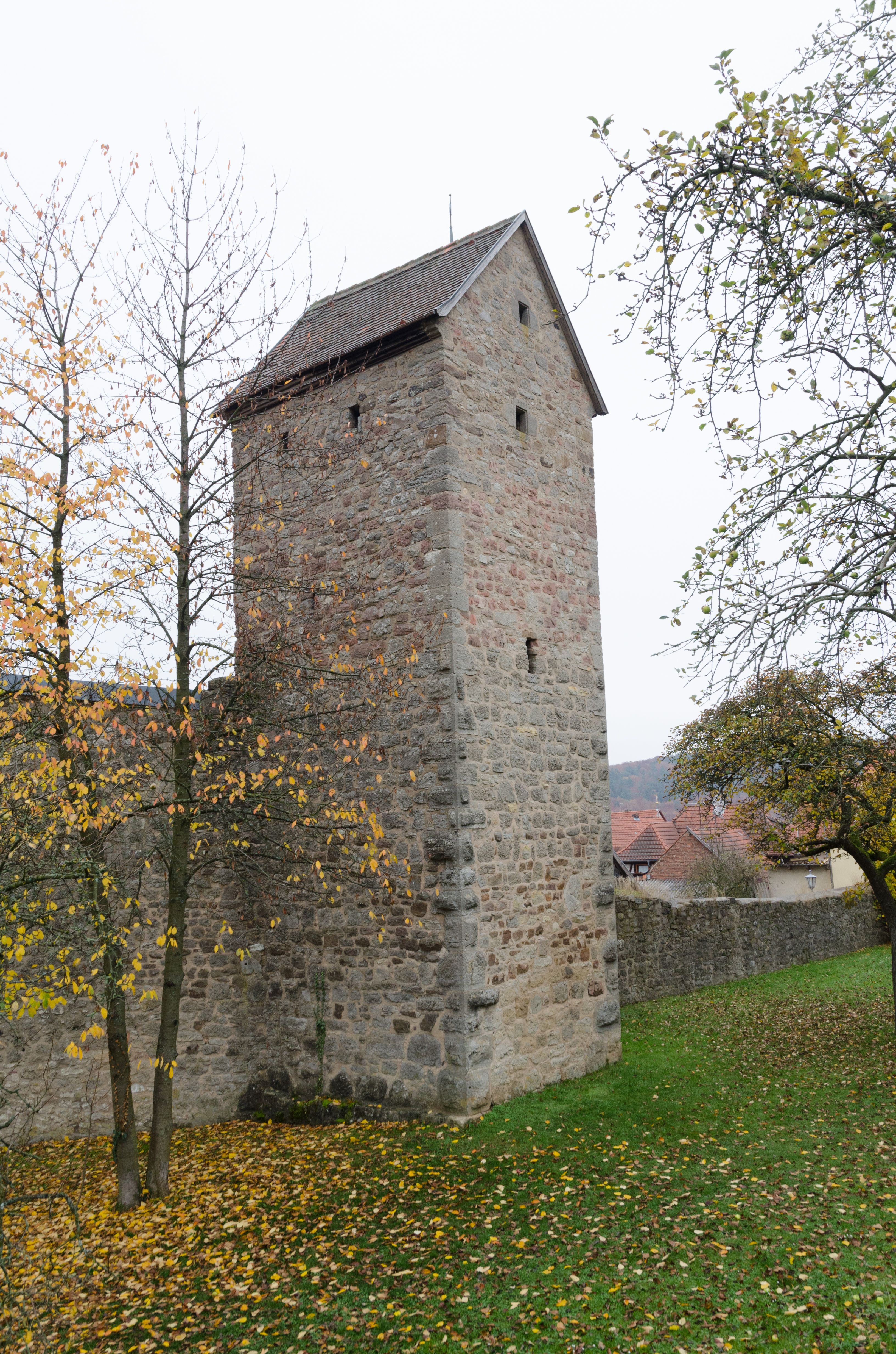 Stadtmauer Flandungen